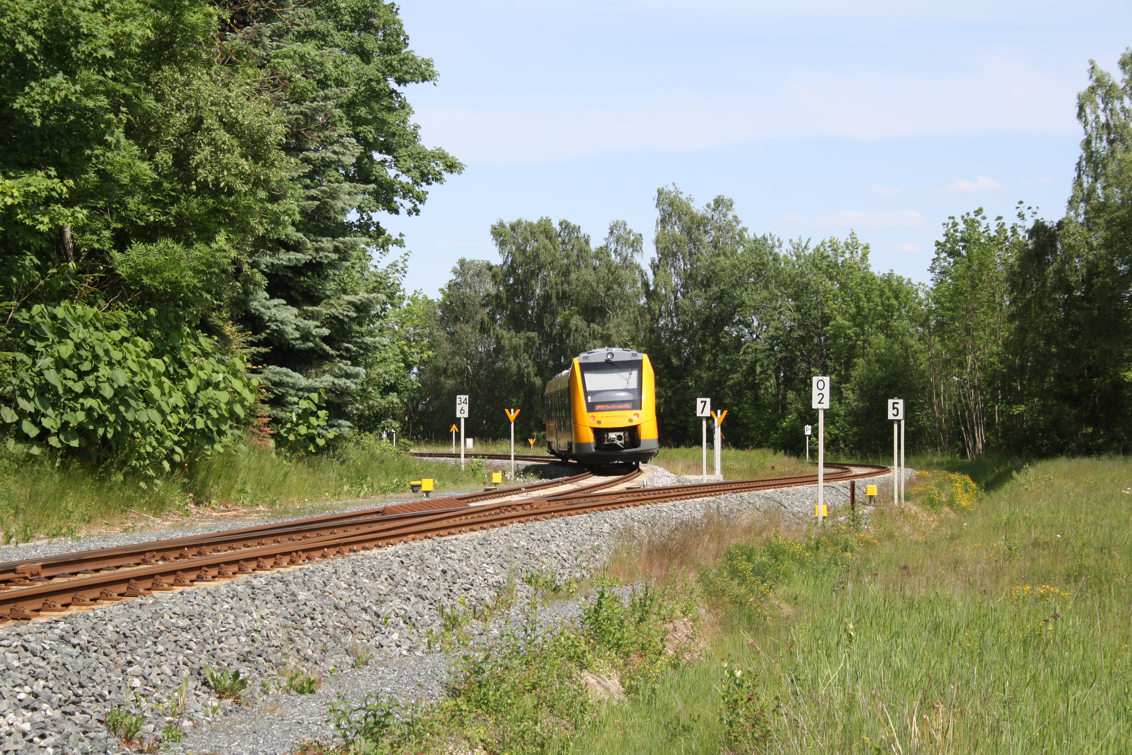 Abzweig Selb-Plößberg